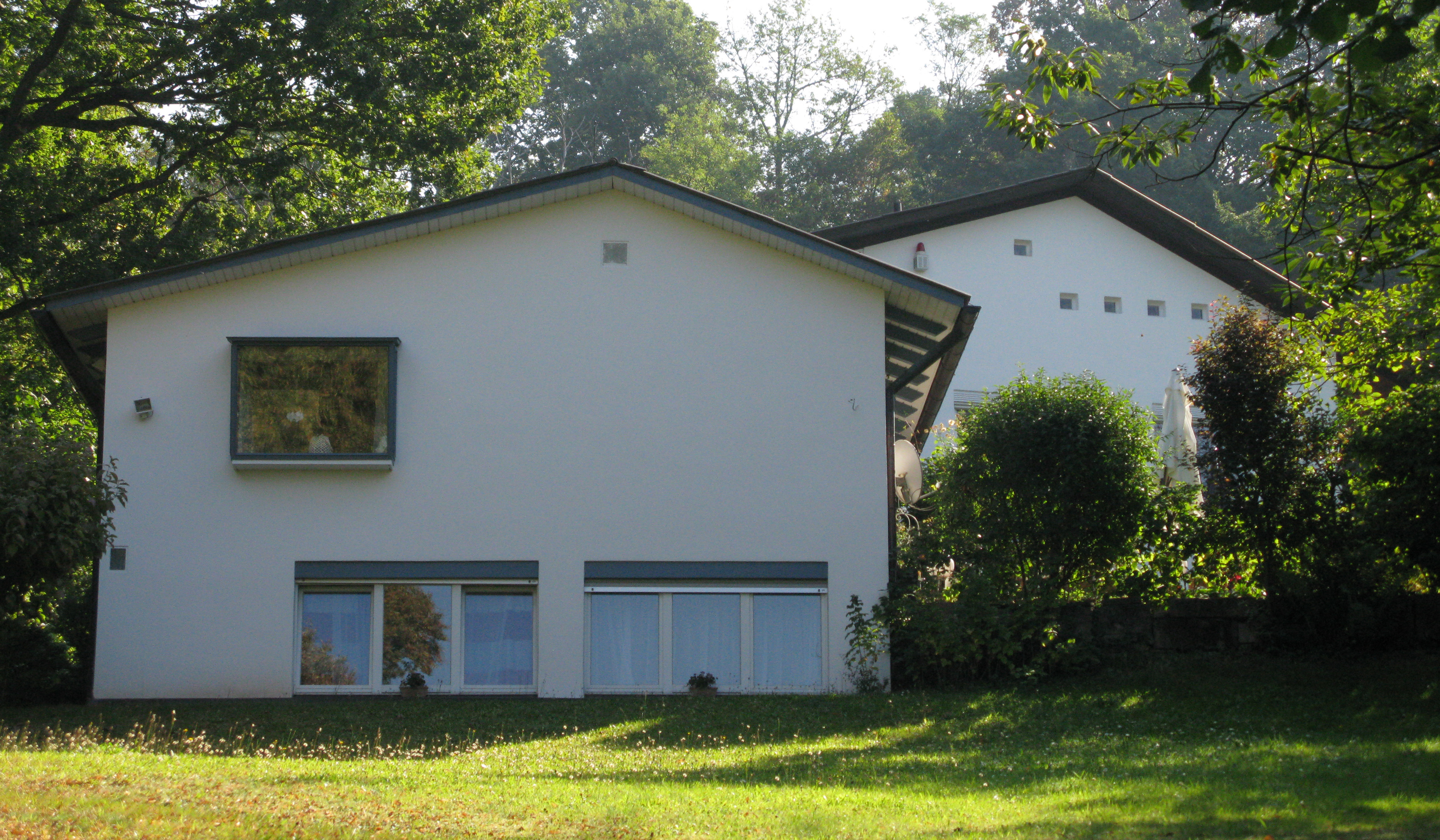 Horst Lindes Wohnhaus am Freiburger Lorettoberg, 1950 von ihm selbst entworfen